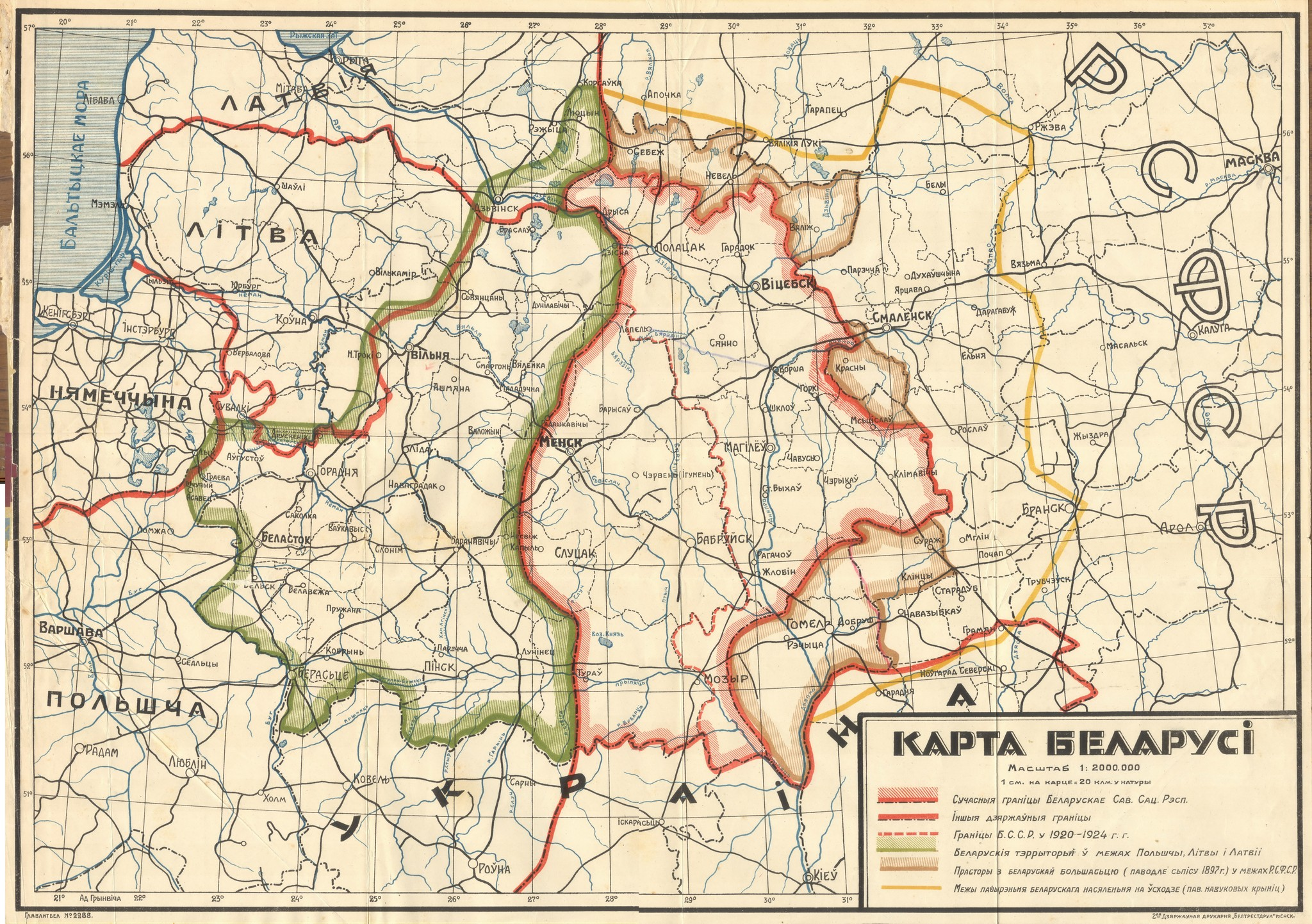 Беларуская (тарашкевіца): Беларусь (Biełaruś). Мапа